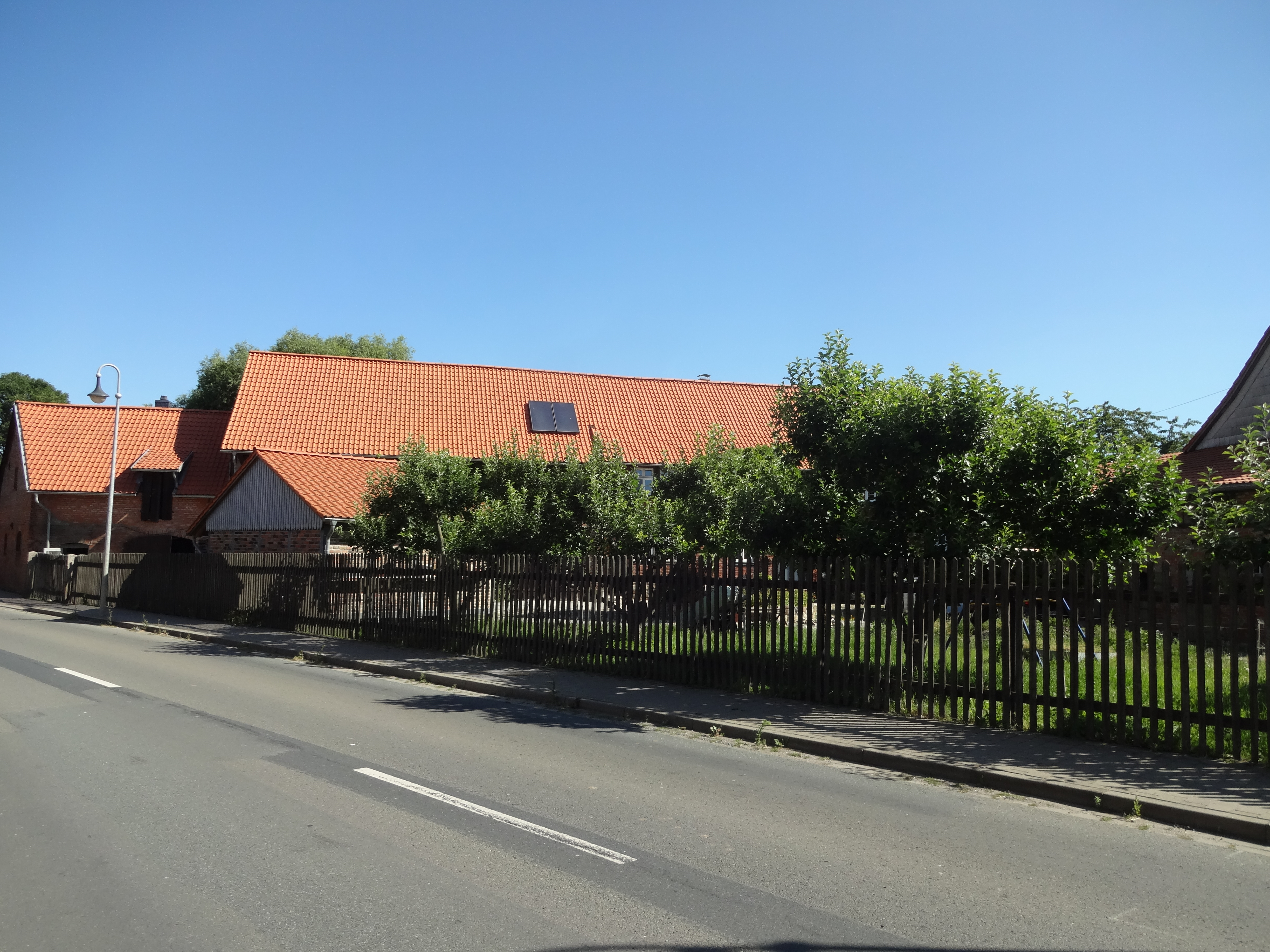 denkmalgeschützter Bauernhof in der Hauptstraße 38 in Langeln, Gemeinde Nordharz